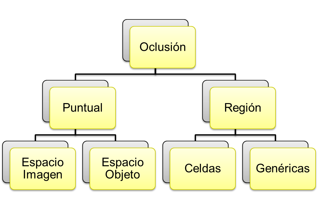 Tecnicas de Visibilidad